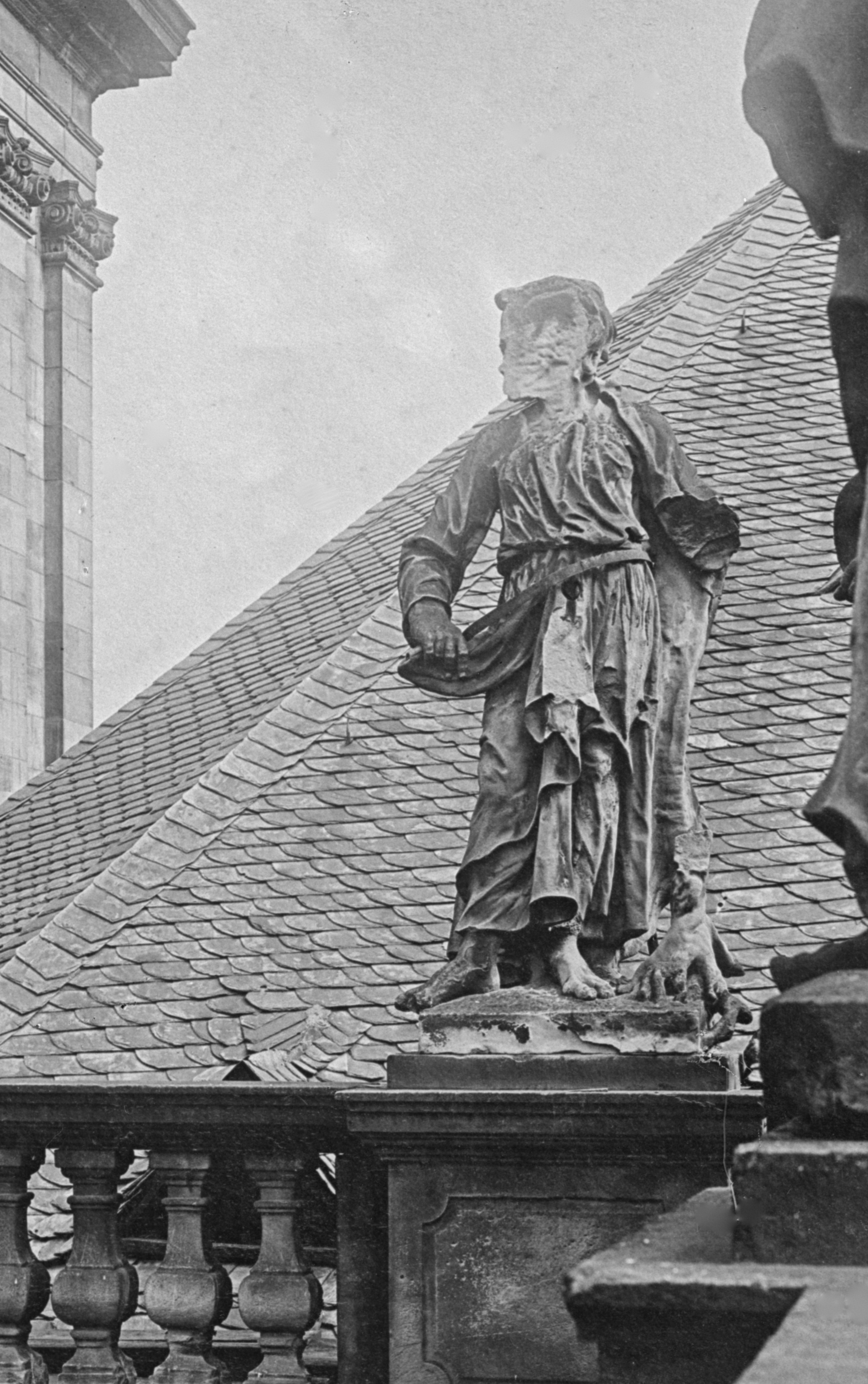 Balustrade der Ludwigskirche, historisches Foto von 1906